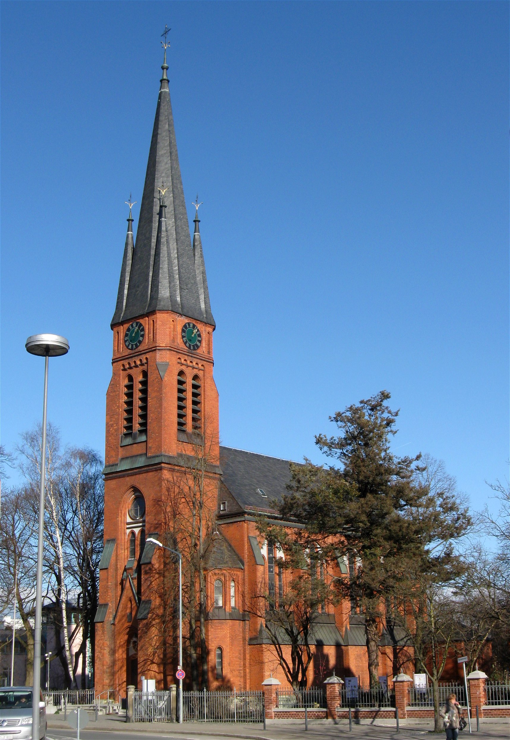 Königstraße 21; Evang.-Luth. Erlöserkirche, 1885/86 nach Plänen von August Hartel, Leipzig, in Formen der norddeutschen Backsteingotik errichtet